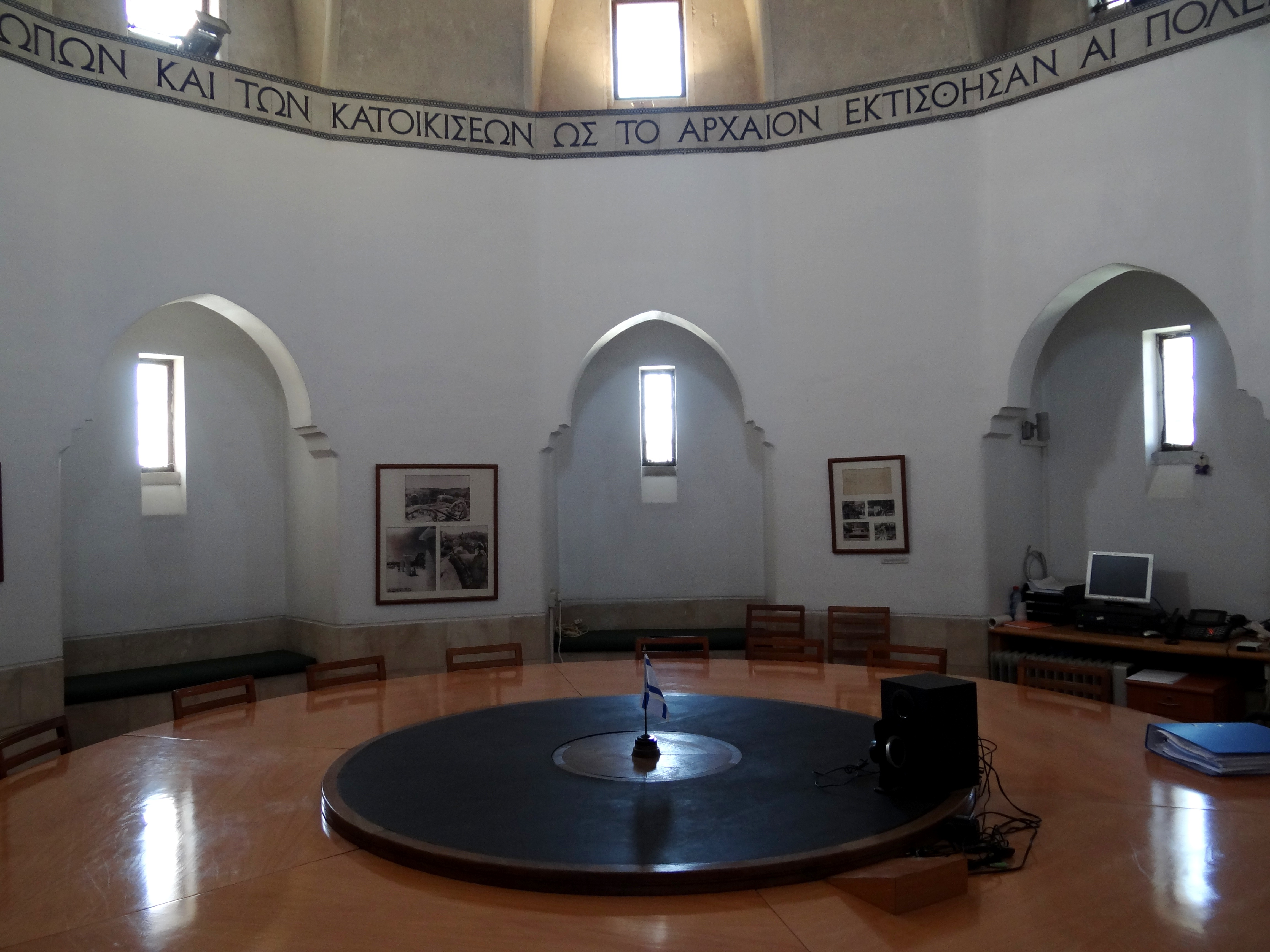 Inscription in the round conference room of the Rockefeller Museum Israel Antiquities Authority, which appears in the dialogue by Plato. The Inscription is set by the Rockefeller Museum architect during the construction of the building. Inscription tiles made by ceramicist David Ohannessian, Dome of the Rock Tiles studio, Via Dolorosa כתובת בחדר הישיבות העגול של רשות העתיקות במוזיאון רוקפלר, ובה מופיע דיאלוג שכתב אפלטון. הכתובת נקבעה על ידי אדריכל מוזיאון רוקפלר בעת בניית המבנה. הפעם הראשונה בה הוזכרה בכתובים המילה "ארכאולוגיה" הייתה בדיאלוג פרי עטו של אפלטון המספר על שיחה שהתקיימה בין סוקרטס הפילוסוף היווני בן המאה ה-5 לפנה"ס והיפיאס. בשיחה עונה היפיאס לשאלת סוקרטס "מה מעניין אנשים?", תשובת היפיאס היתה: "עמים, גיבורים ובני אדם, יישובים וכיצד נוסדו הערים בימי קדם, ובקיצור, הם מוכנים לשמוע על ארכאולוגיה". (אפלטון,היפיאס רבה, 285 ד).